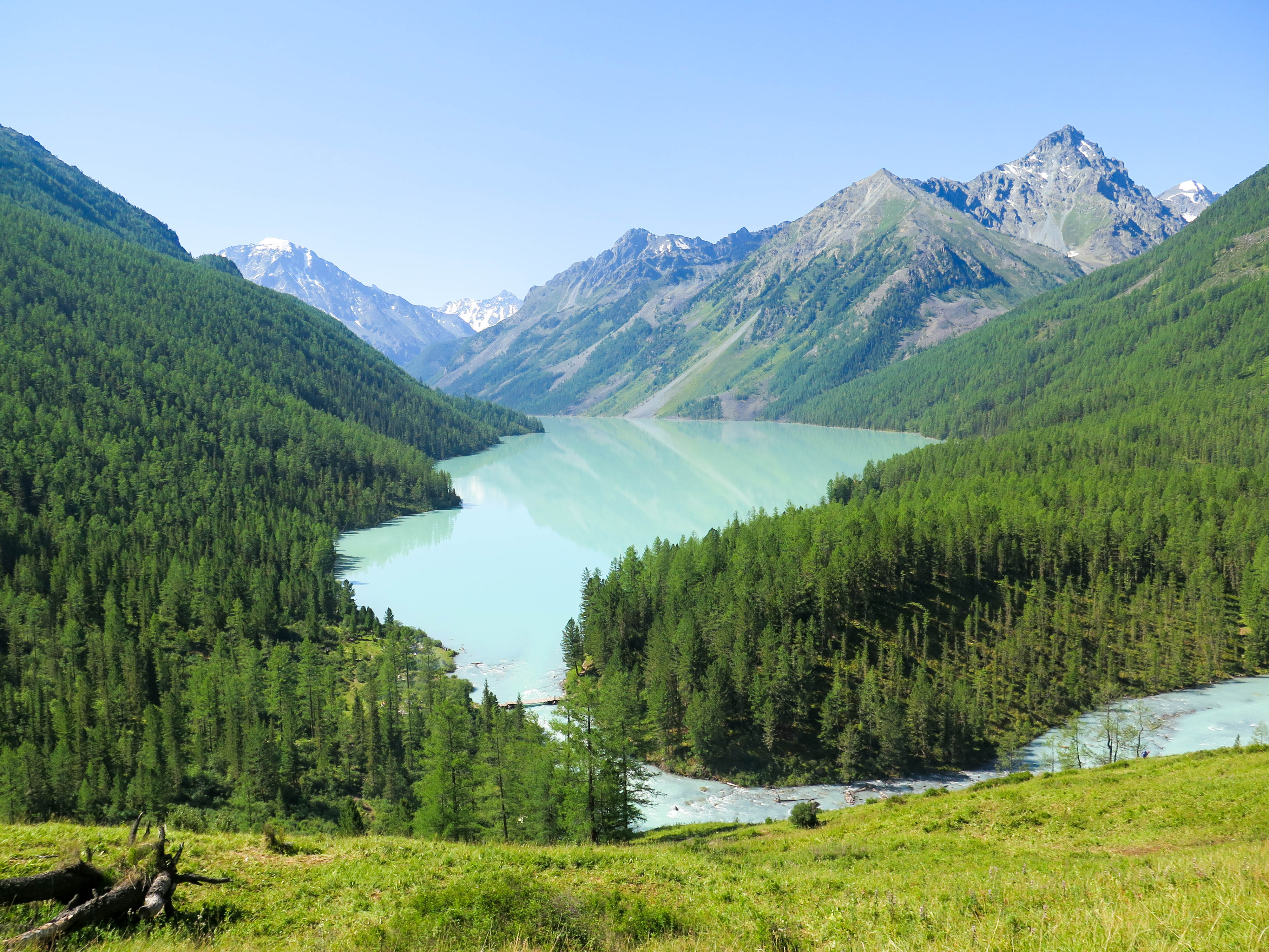 Кучерлинское озеро: на северном макросклоне Катунского хребта в верховьях долины р. Кучерла в 30 км к югу от с. Кучерла. Озеро значительно вытянуто в меридиональном направлении. Абсолютная высота уреза воды 1786 м над уровнем моря, Усть-Коксинский район, Алтай This image is related to the protected area of Russia number 0410043